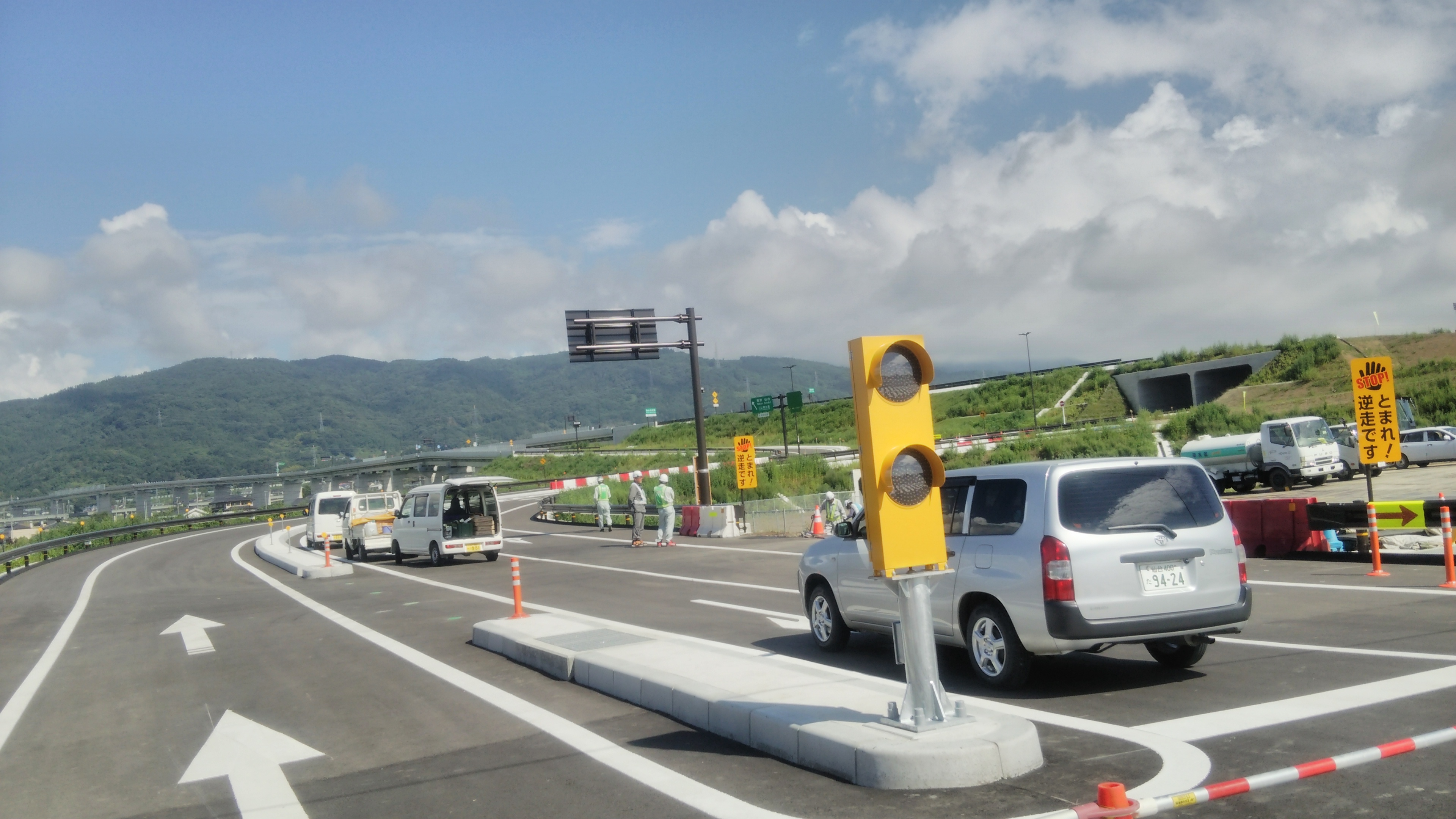 入り口画像